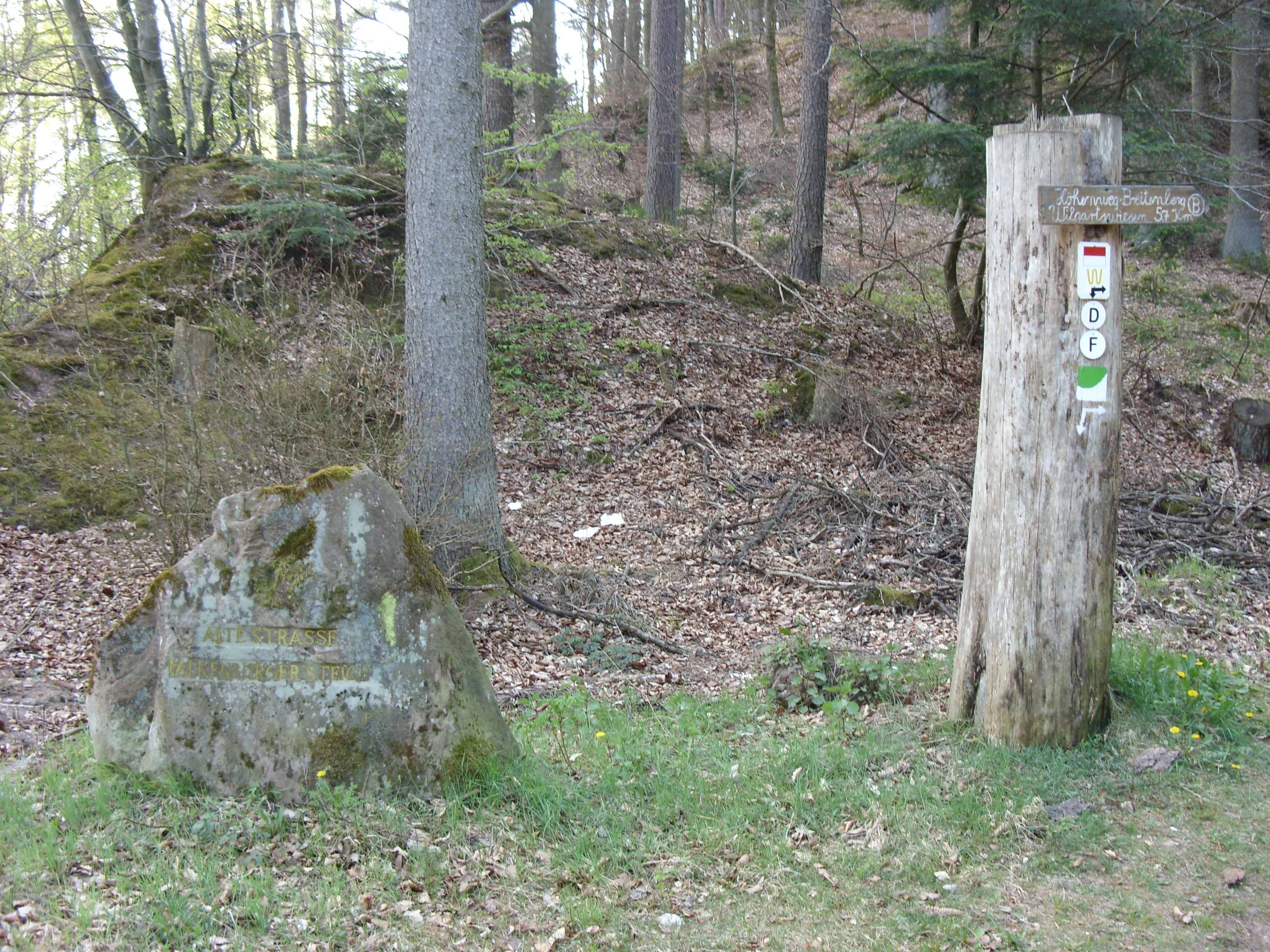 Ritterstein Nummer 224, Alte Straße - Falkenburger Steige, Wilgartswiesen.